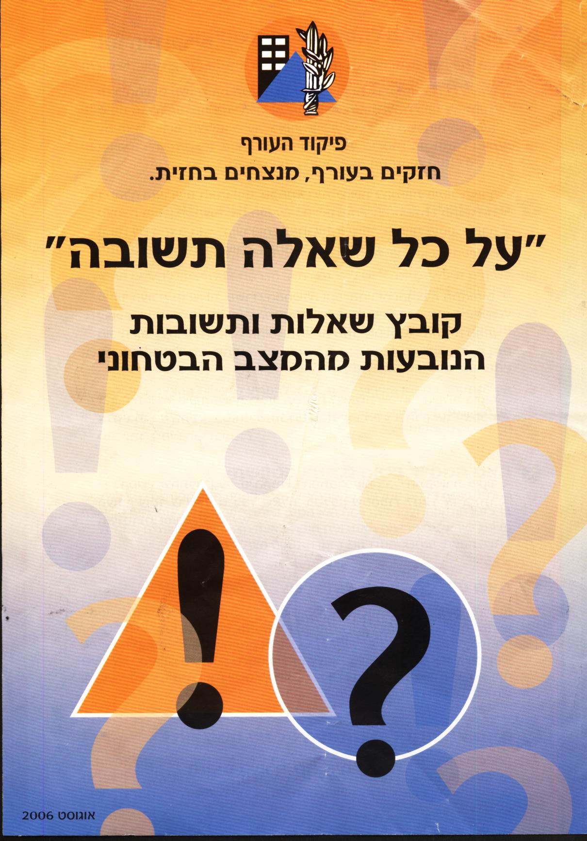 עלון הבהרה שחולק בדואר בזמן he:מלחמת לבנון השנייה.